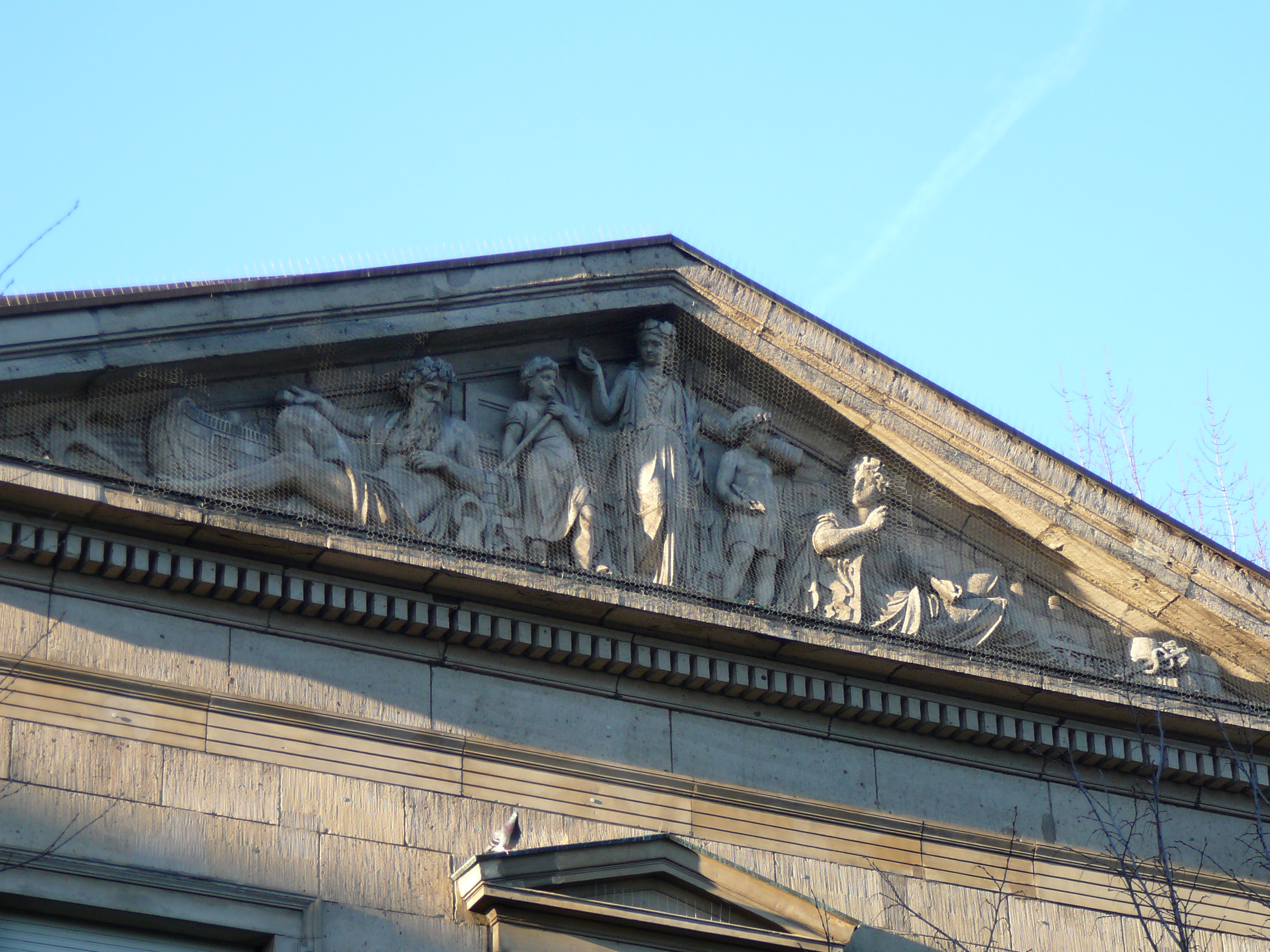 Briller Str, Wuppertal